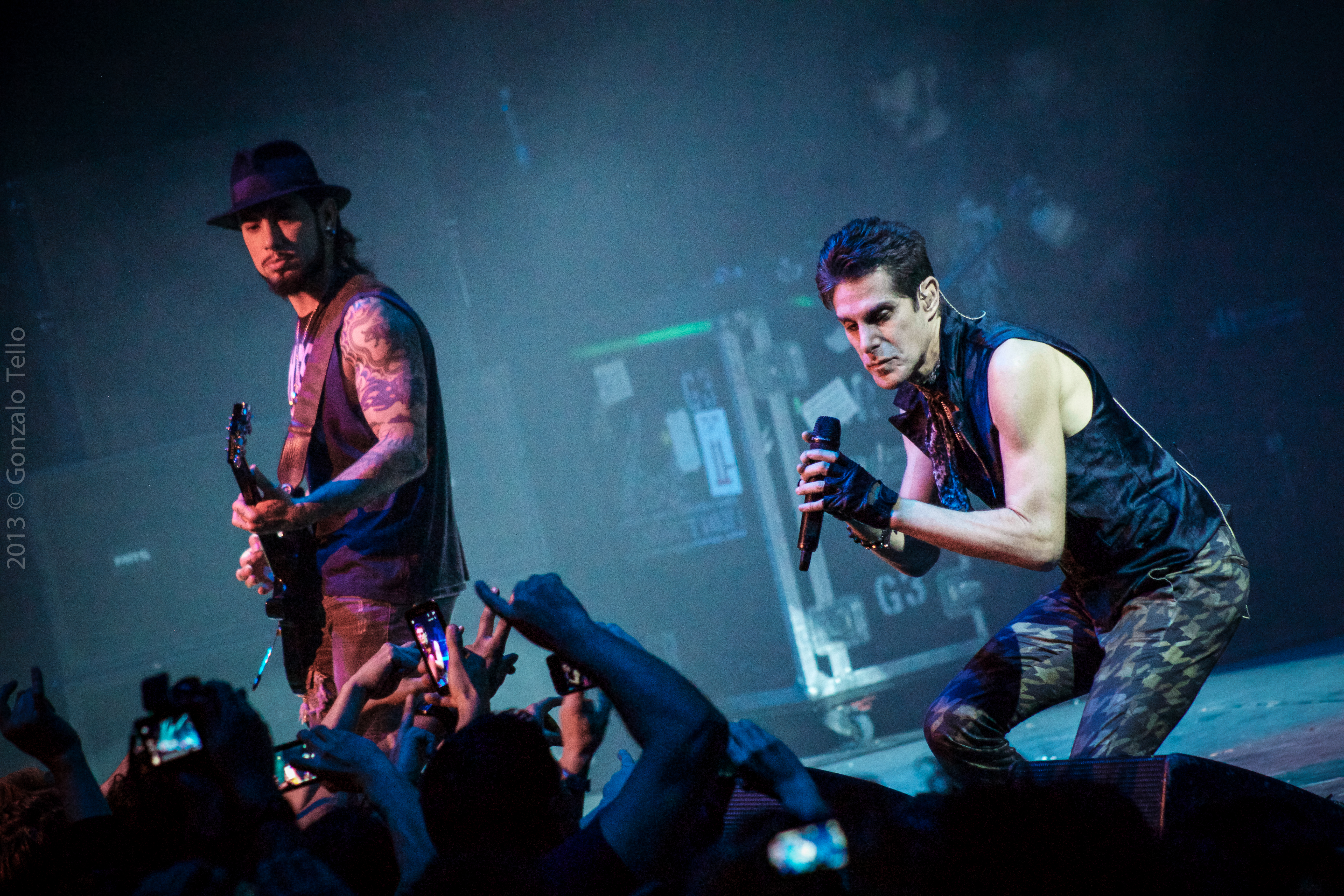 Foto: Gonzalo Tello